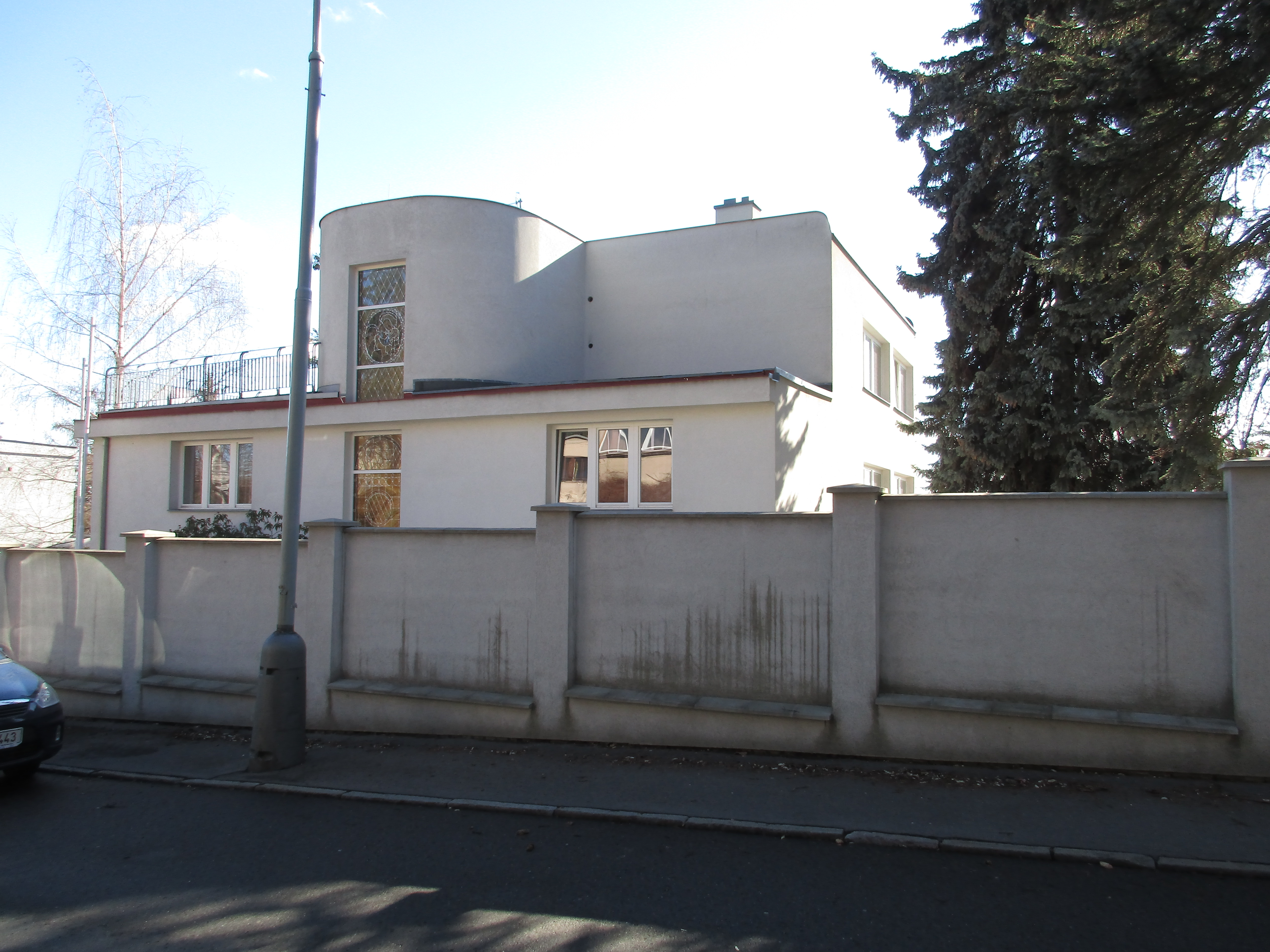 Barrandovská 155/15, Praha 5-Hlubočepy.